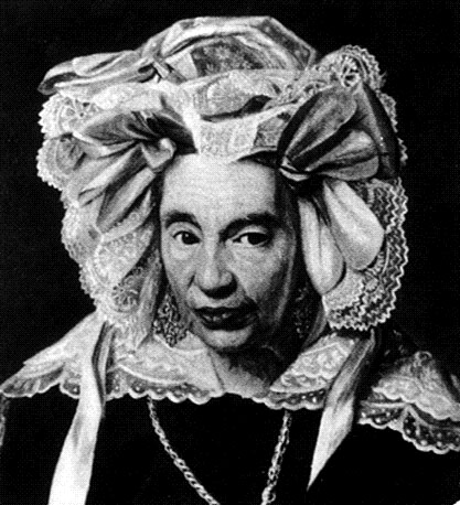 Gutle Rotschild